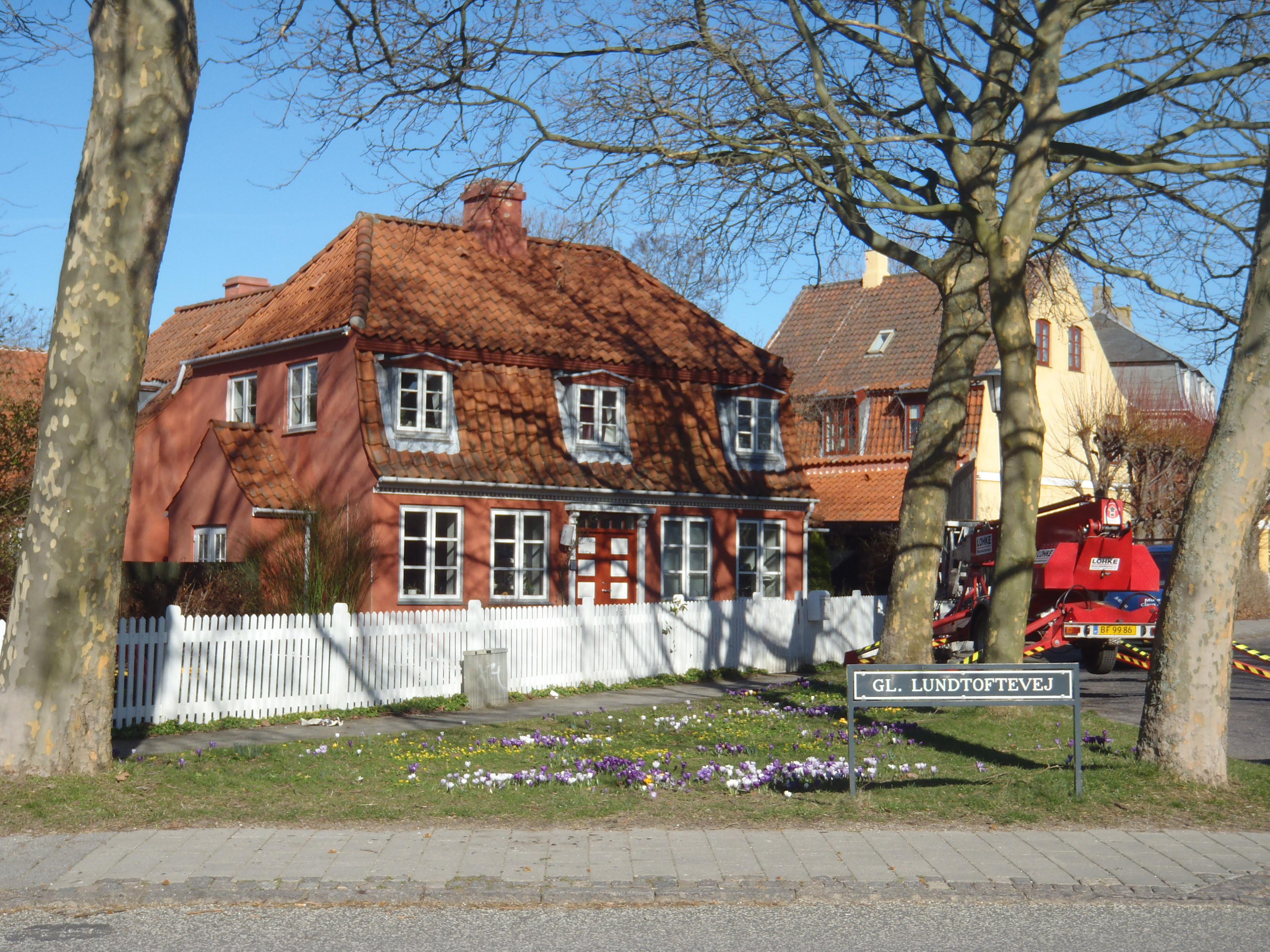 Hus i Bondebyen, Gammel Lundtoftevej, Kongens Lyngby